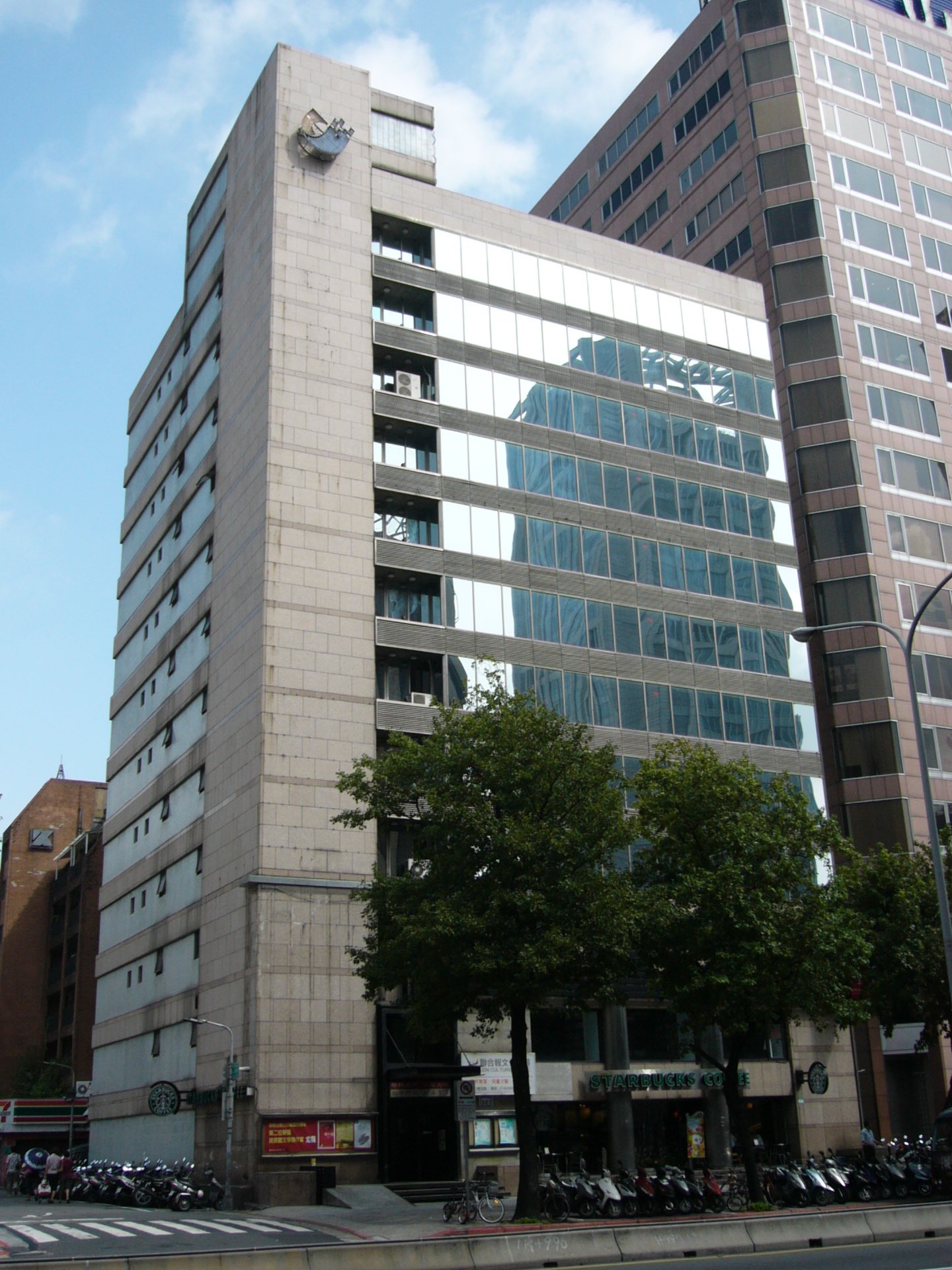 聯合報第三大樓，位於臺北市信義區忠孝東路四段561號，2015年1月時已拆除。